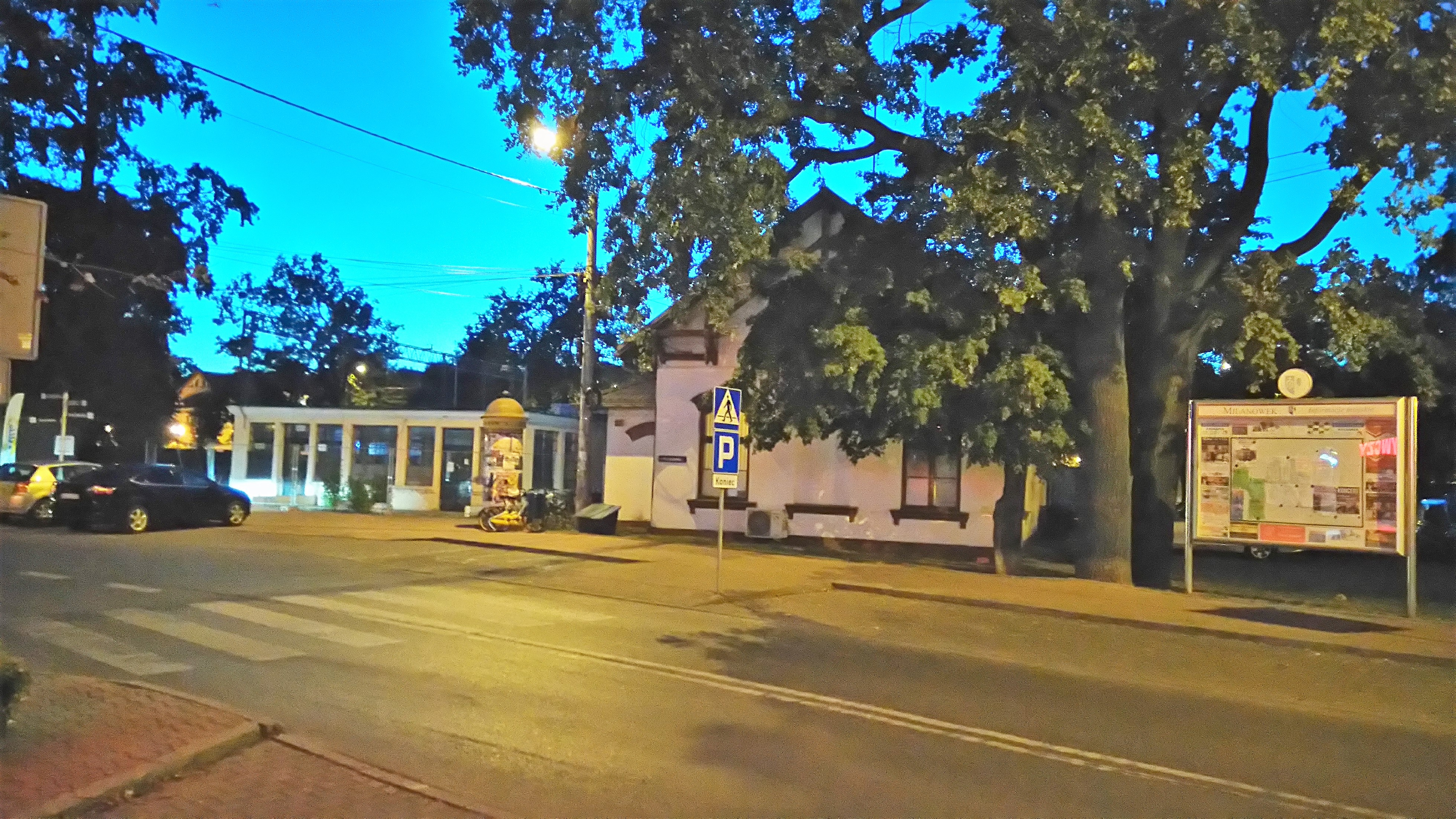 Dworzec PKP w Milanówku